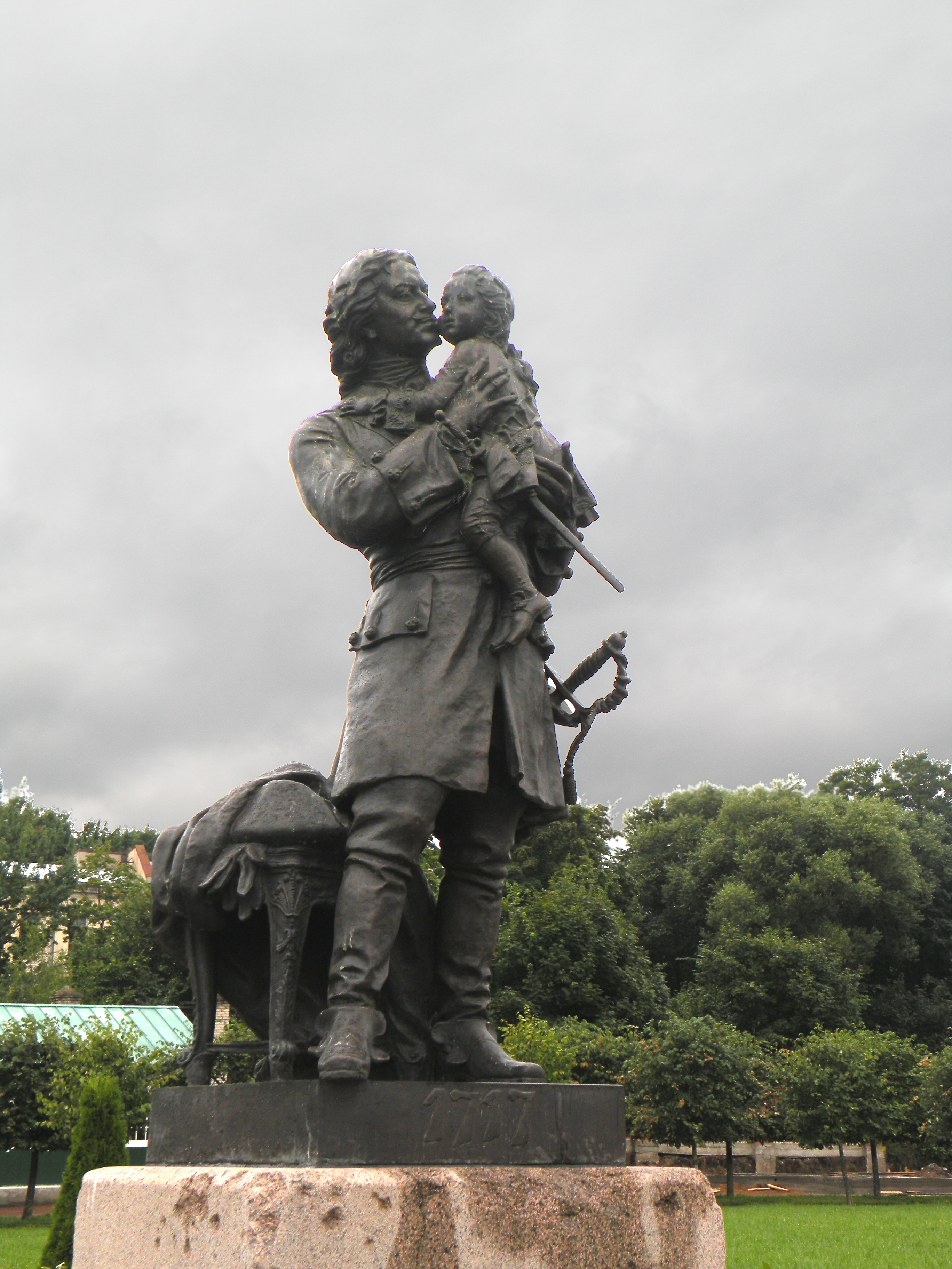 Петергоф.Пётр и Людовик XV